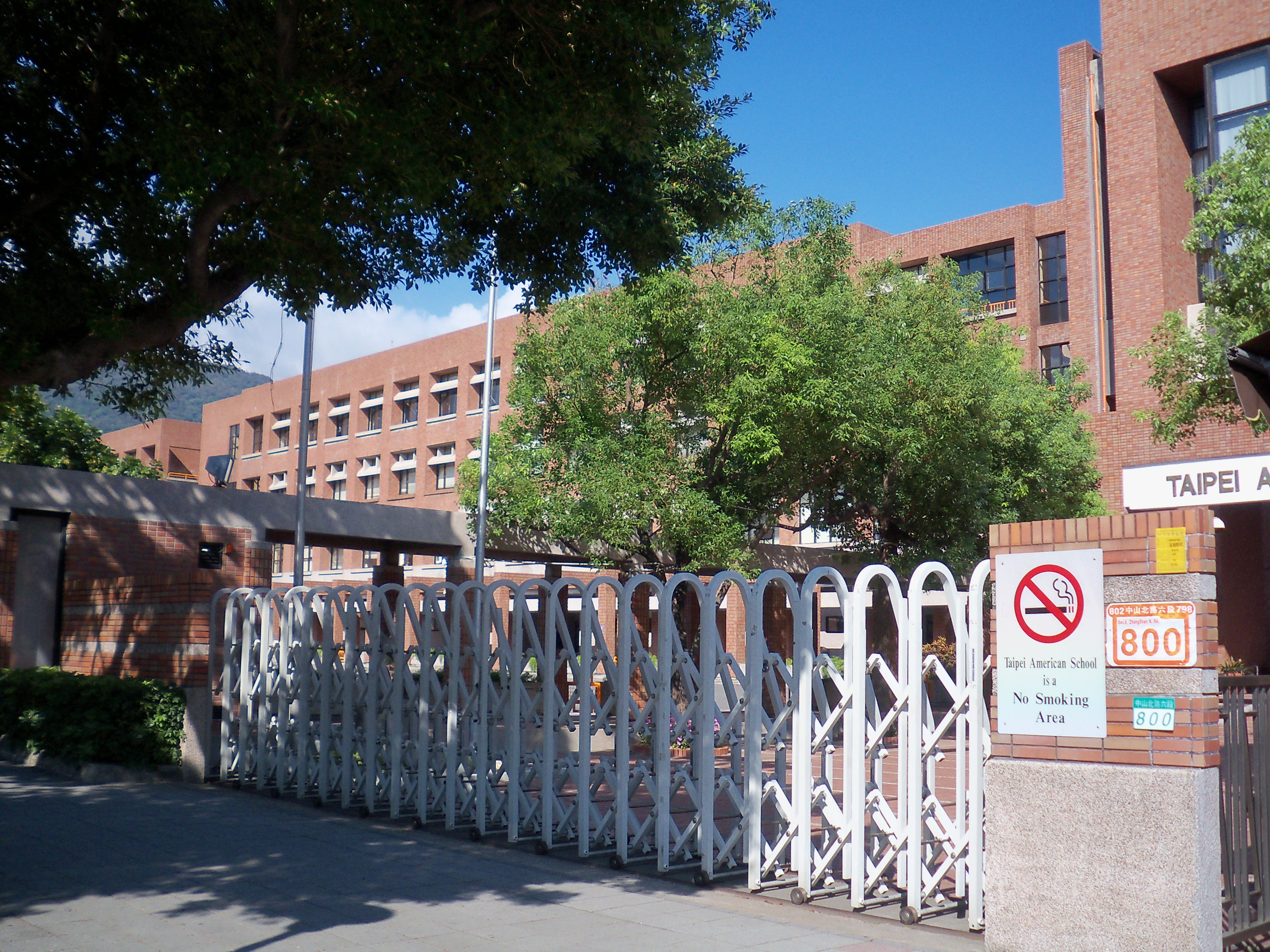 夏日午後的臺北美國學校正門前。